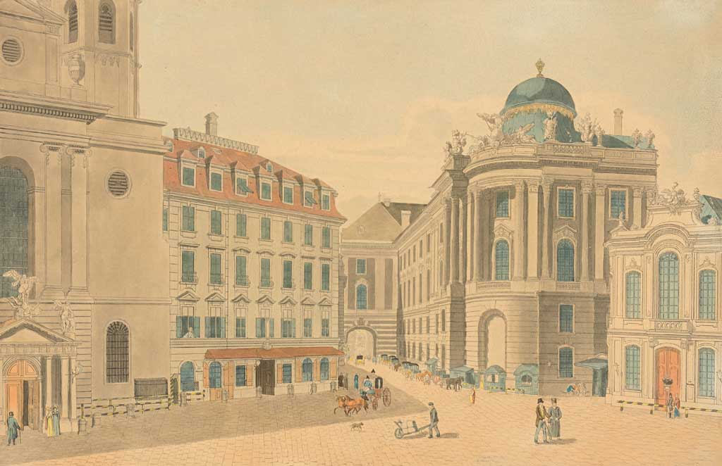 Wien. Der Michaelerplatz, die Kirche, die KK Reitschule und das KK National Theater. Kolorierte Umrissradierung von C. Schütz bei Artaria & Comp. Wien, Druck Anf. 19. Jh. 26,5 x 41 cm